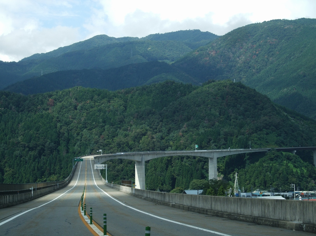 中部縦貫自動車道 油坂峠道路 （白鳥IC～白鳥西IC） 福井方面へ向かう